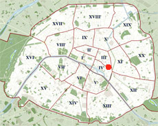 מפת פריז עם סימון פלאס דה ווז' רישיון נוצר על ידי משתמש:רועי בושי